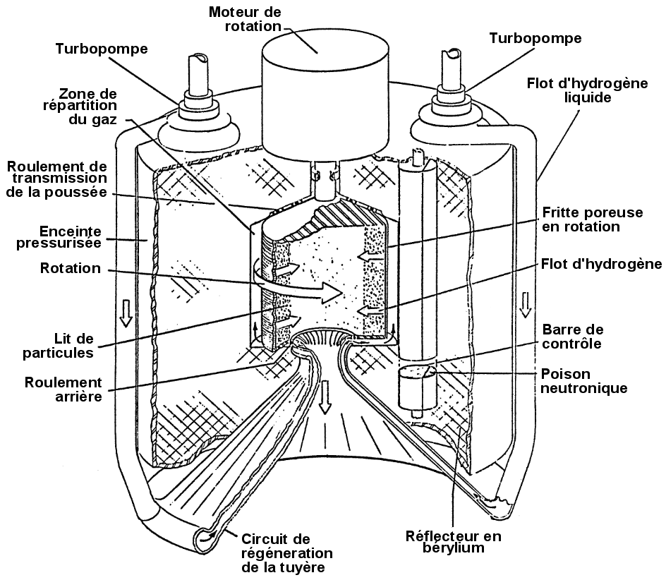 Le Réacteur à Lit Rotatif est un Réacteur à Lit de Particules dans lequel les particules sont maintenues contre la paroi par centrifugation, il ne requiert pas de fritte intérieure chaude et peut atteindre des températures de sortie plus élevées.